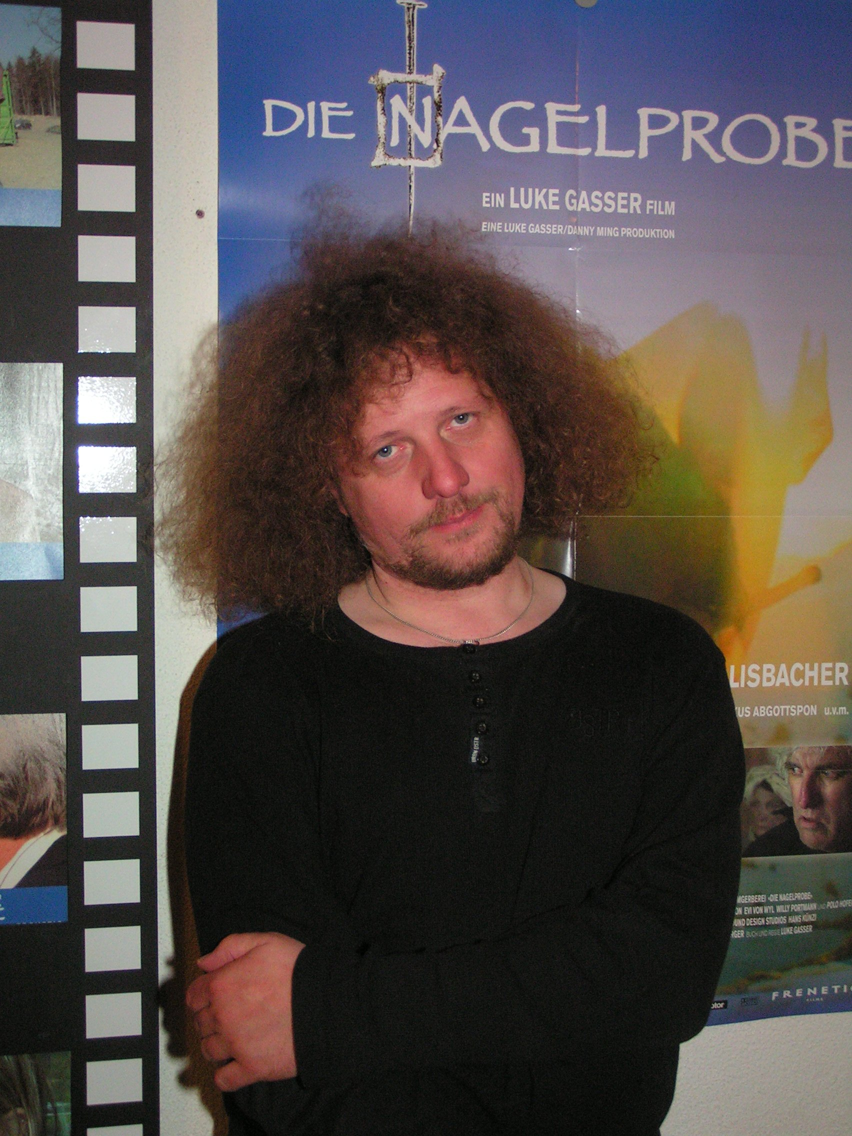 Luke Gasser, Schweizer Rockmusiker und Filmemacher